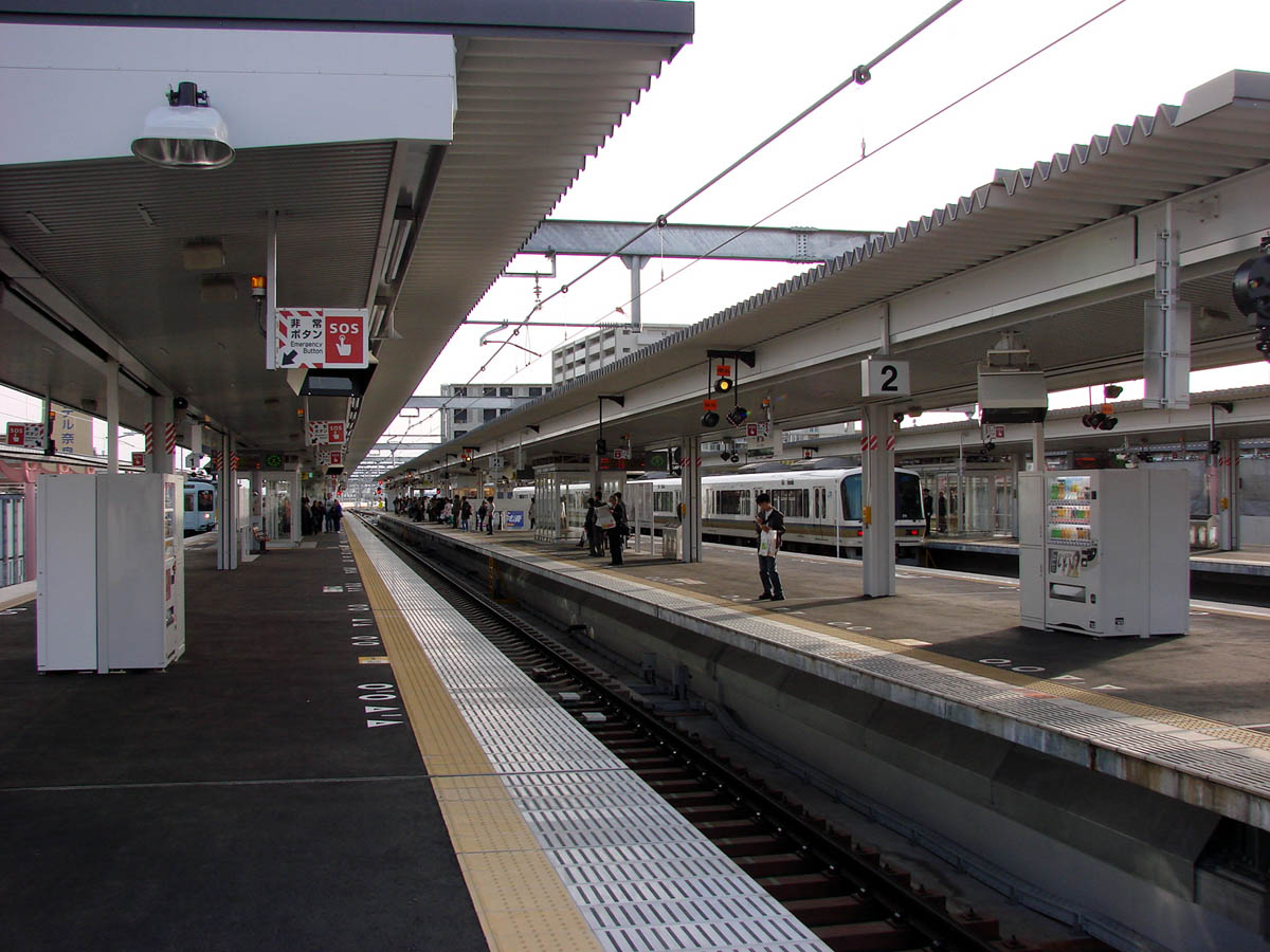 JR奈良駅ホームの様子